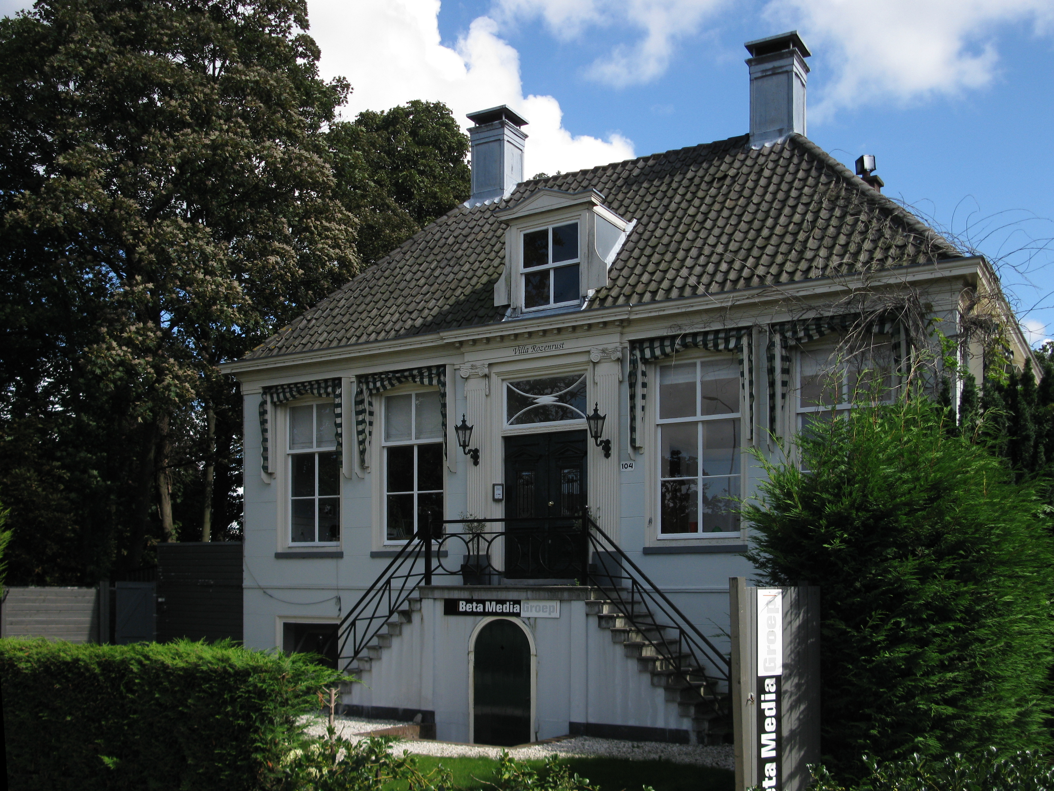 Veursestraatweg 104 te Leidschendam, voorgevel van villa 'Rozenrust', Rijksmonument 25729